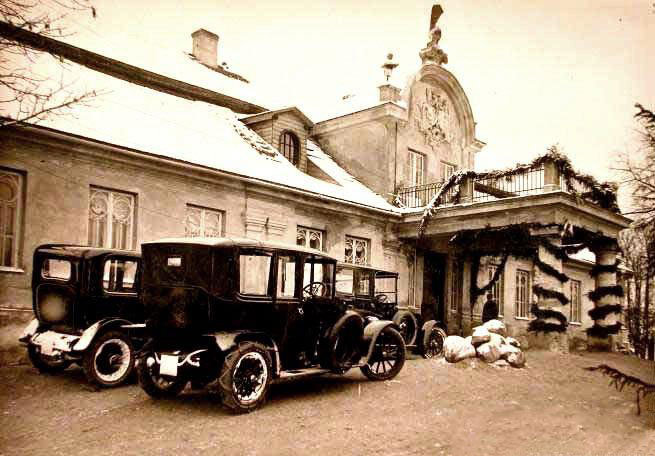 Беларуская (тарашкевіца): Дунілавічы (Duniłavičy), палац Тышкевічаў (Tyškievič)